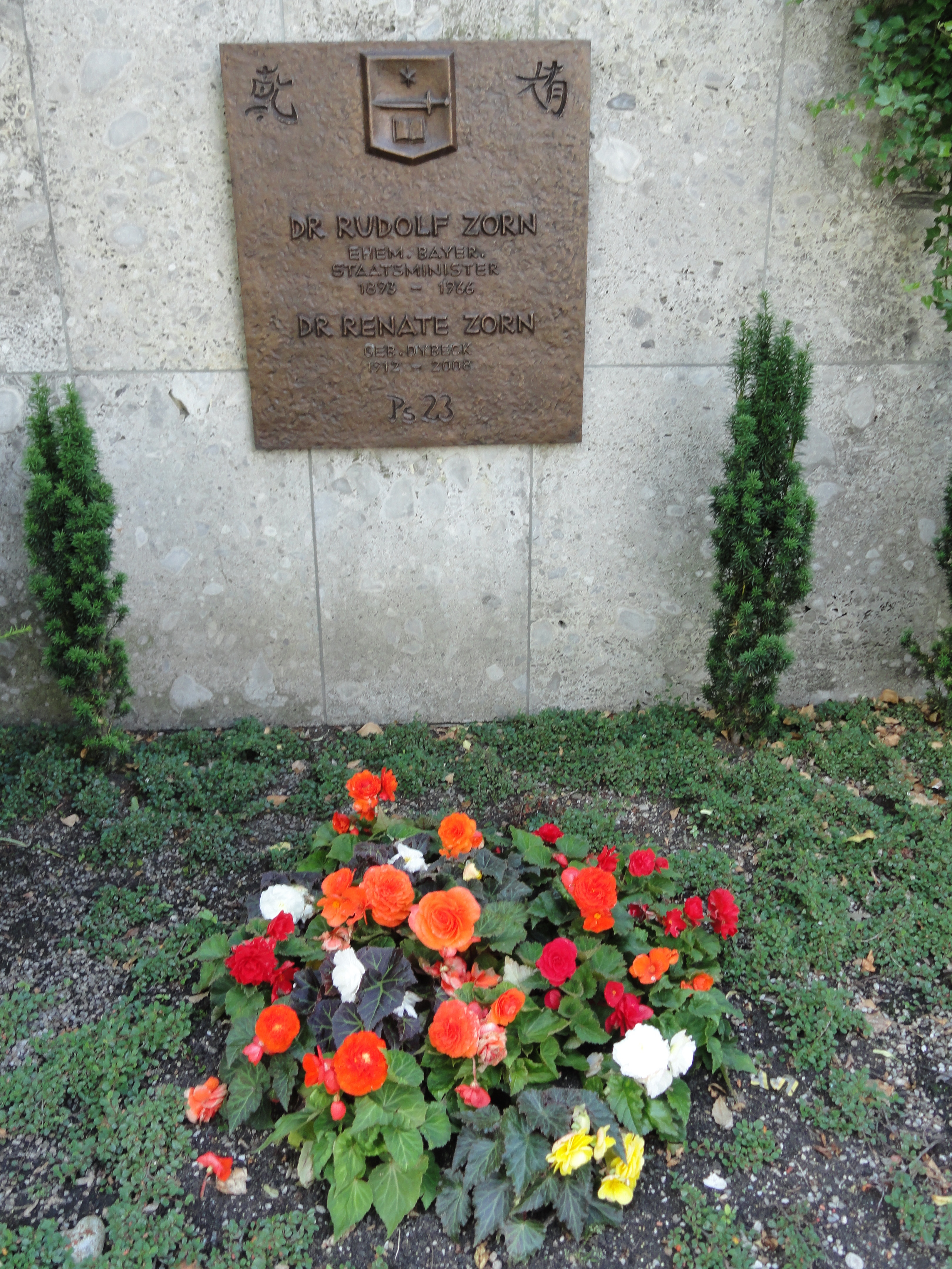 Evangelischer Friedhof Kempten - Friedhofskapelle, Ausgrabungen dahinter sowie Grabstellen einiger "Promis"